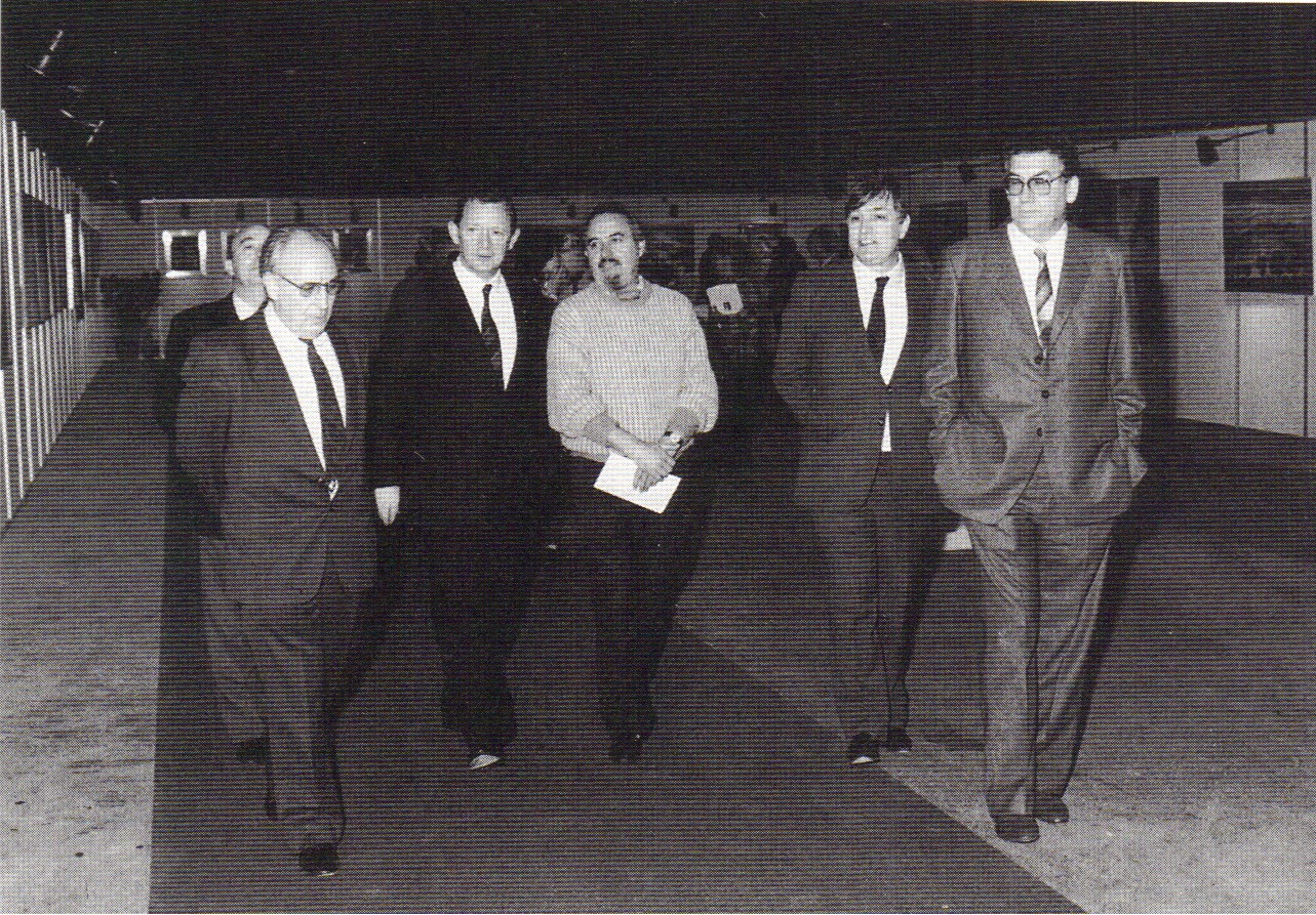 Ruizanglada 1987 en el Homenaje a Viola. De izquierda a derecha, José Ramón Bada consejero de cultura, Santiago Marraco presidente del Gobierno Aragón, Angel Azpeitia Burgos y Jesús Gomollón